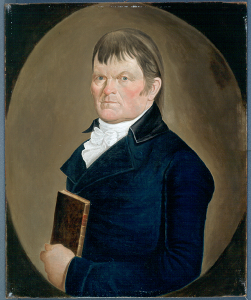 Gamaliel Painter (1743-1819)